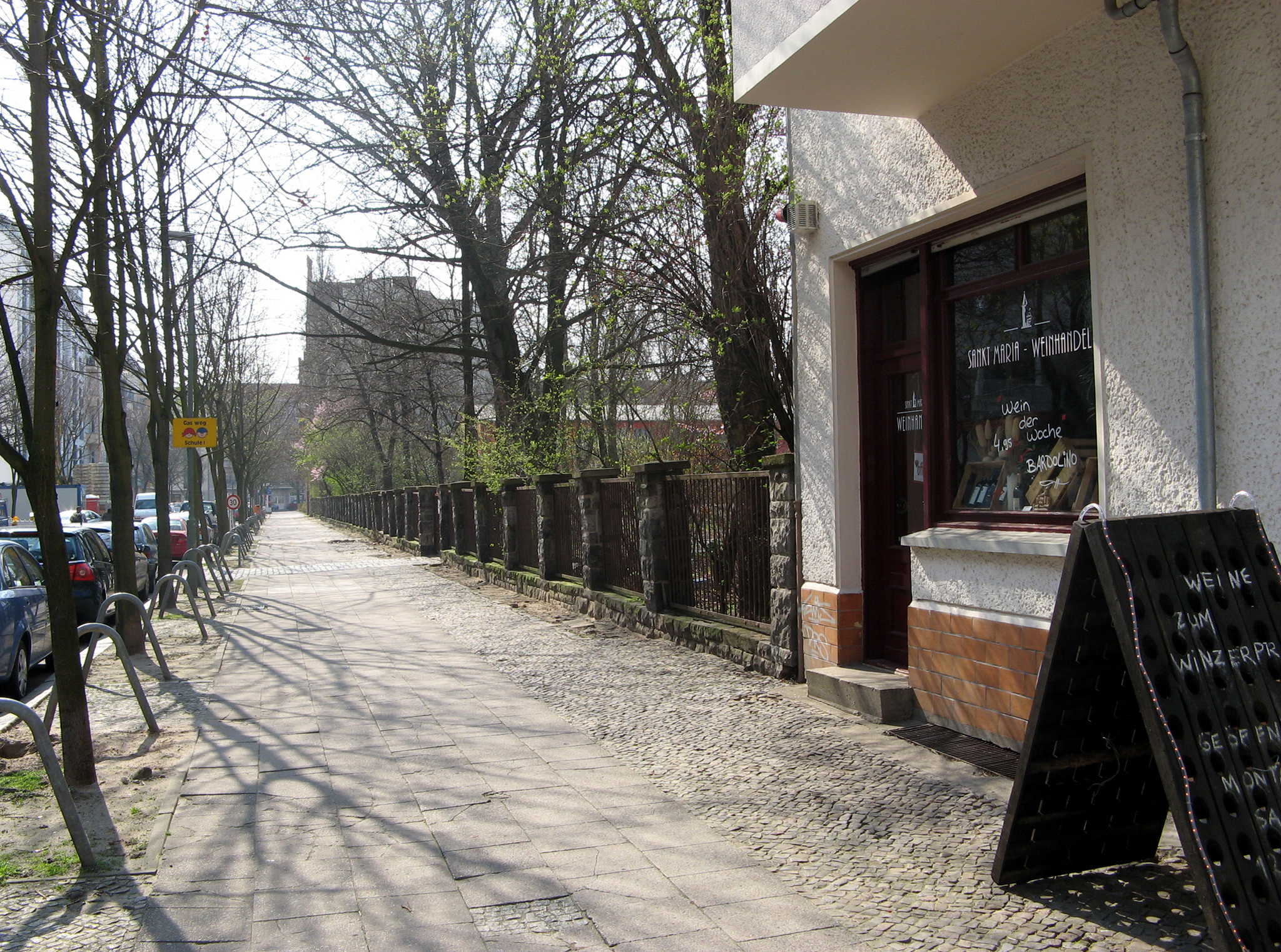 Diese lange Reihe Steinpfeiler ursprünglich mit Zaunfeldern aus Holzlatten, später mit metallenen Zaunfeldern grenzte einige Jahrzehnte das Gelände der Kindereinrichtungen zwischen Kadiner und Lasdehner Straße zur Kadiner Straße hin ab. Mit den Bau-, Sanierungs- und Umgestaltungsmaßnahmen im Rahmen des Programms „Stadtumbau Ost“ ab 2002, vor allem der Freiflächenneugestaltung für das Regenbogenhaus (Kadiner Straße 9) und die Schulen und ihre Horte ab 2007 wurde ein neuer schöner Bogenzaun gesetzt und nur einige Steinpfeiler etwas niedriger als historische Reminiszenz erhalten.